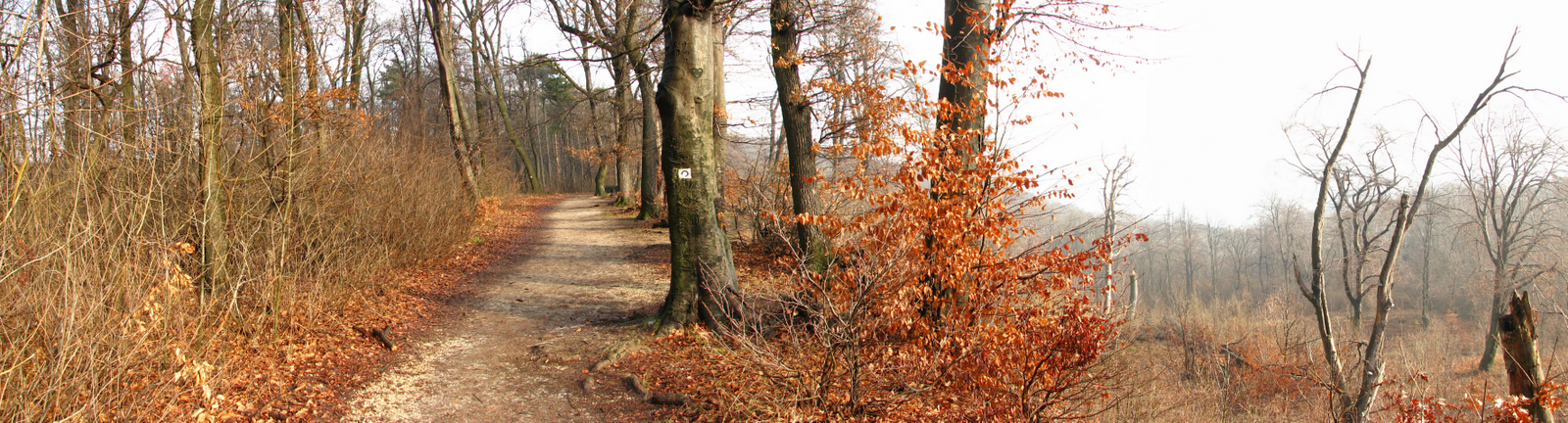 Normafa